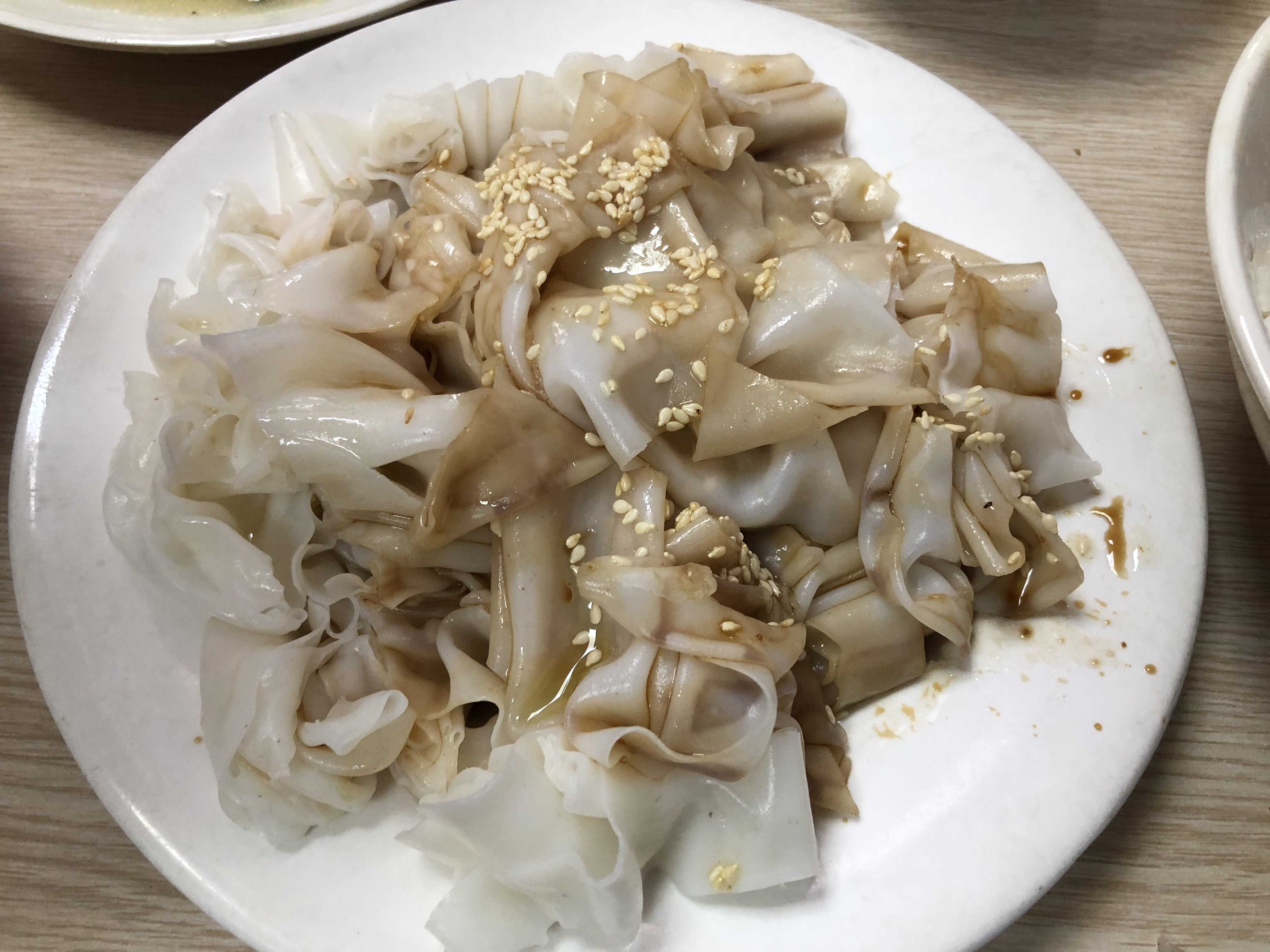 中文（中国大陆）: 一碟茂名市区内的香油捞粉皮，与信宜食惯嘴捞粉是同一个物种，亦是广东肠粉的变体，制作方法较肠粉简单，系用肠粉的主料米粉制成，不包裹任何荤素配菜（芝麻、葱除外），最大特色是辅以韭菜油（用韭菜榨出的油）为佐料，搅拌均匀后可使用，价格便宜（在90年代时约为5毛至1元一碟）。此照片拍摄时为3元一碟。